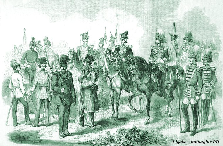 Divise dell'esercito austriaco nel 1859.